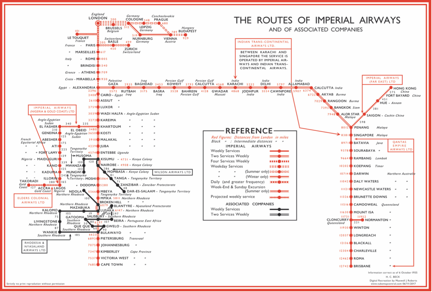 Lignes aériennes d'Imperial Airways compagnie aérienne britannique en 1939